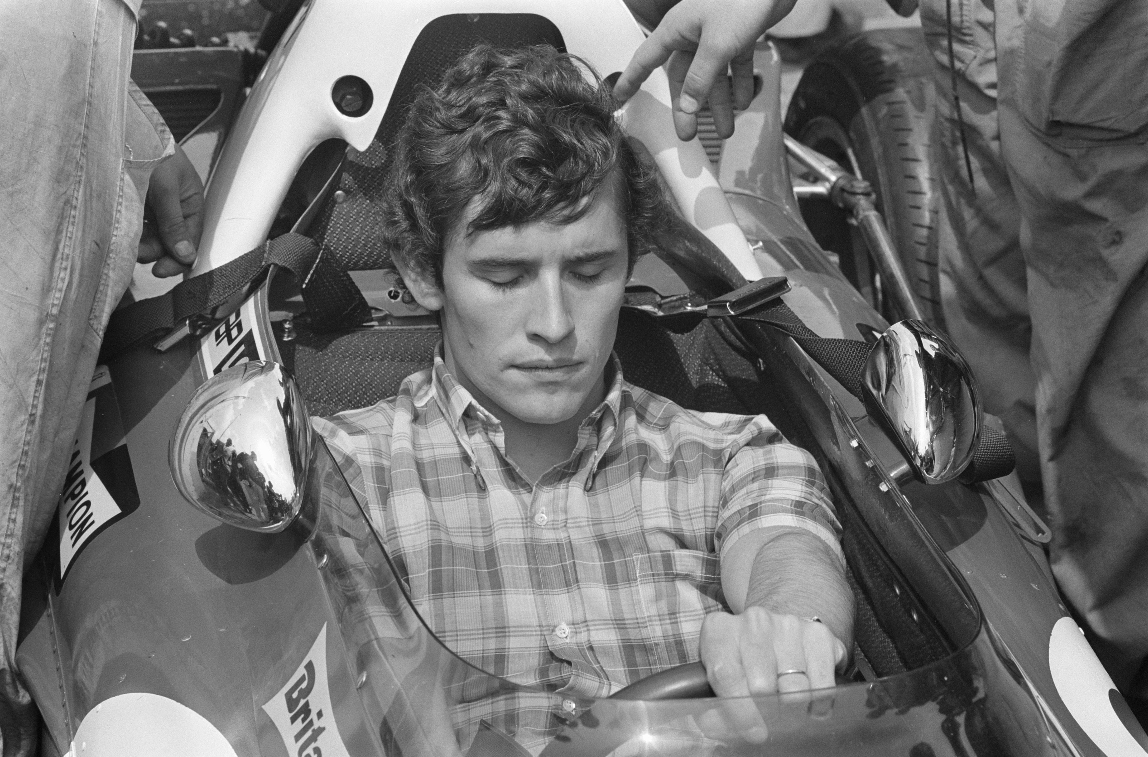 Collectie / Archief : Fotocollectie Anefo Reportage / Serie : Training voor de Grand Prix van 1971 op Zandvoort voor formule 1-wagens Beschrijving : Jacky Ickx Annotatie : Randnummers negatiefstrook: 4, 5: Jacky Ickx (portret); 5a, 6a: Denny Hulme (l) en Peter Gethin Datum : 18 juni 1971 Locatie : Noord-Holland, Zandvoort Trefwoorden : autosport, circuits, portretten, raceauto's, races, wedstrijden Persoonsnaam : Ickx, Jacky Fotograaf : Fotograaf Onbekend / Anefo, [onbekend] Auteursrechthebbende : Nationaal Archief Materiaalsoort : Negatief (zwart/wit) Nummer archiefinventaris : bekijk toegang 2.24.01.05 Bestanddeelnummer : 924-6613